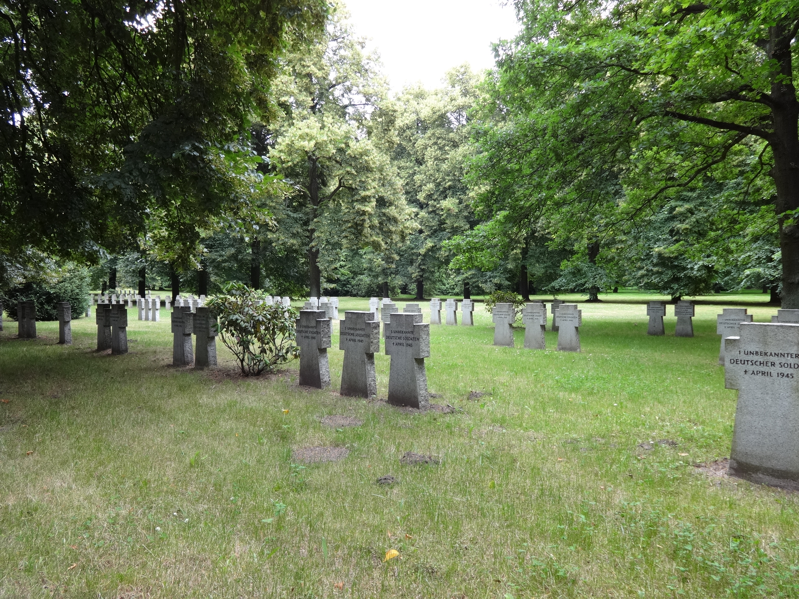 Deutsche Kriegsgräberstätte auf dem Georgenberg in Spremberg. Sie entstand 1995 durch Umbettung von anderen Kriegsgräberstätten in Südbrandenburg, die durch die Devastierung durch den Braunkohletagebau nach Spremberg kamen und dort mit den vorhandenen Kriegsgräbern zusammengeführt wurden.